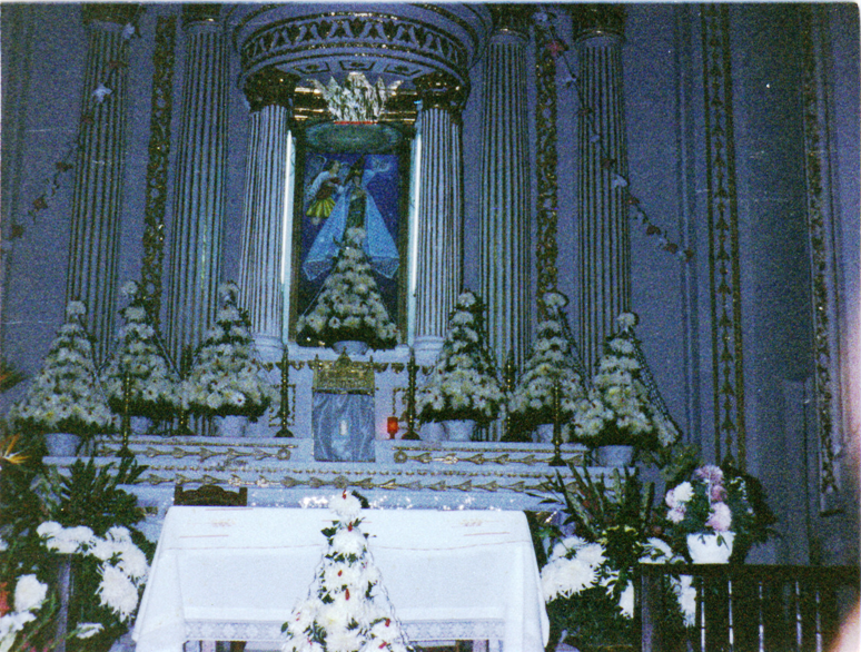 Nuestra Señora de la Defensa, Panotla, Tlaxcala, México.